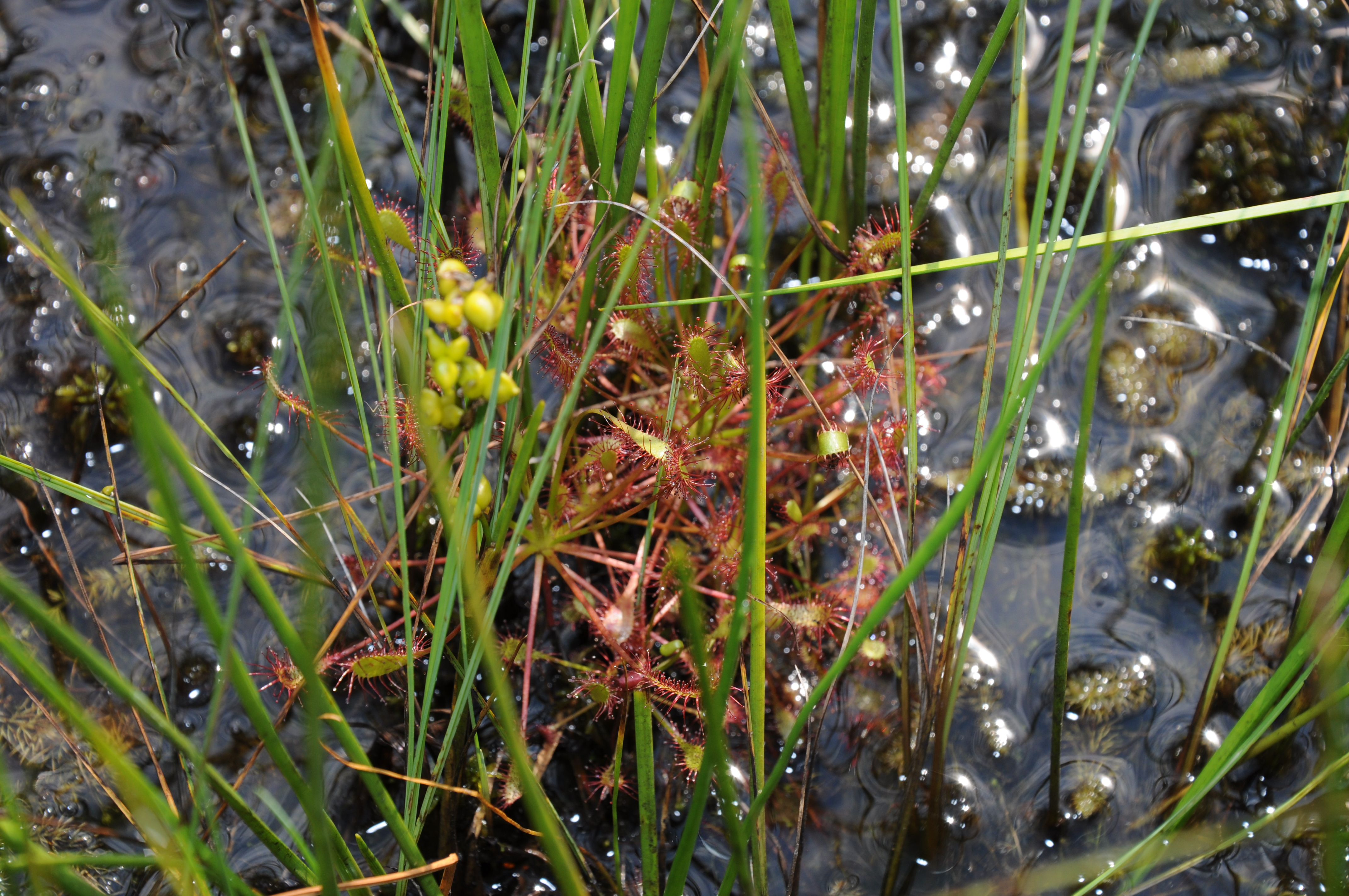 Рівненський природний заповідник, Володимирецький, Дубровицький, Рокитнівський, Сарненський райони